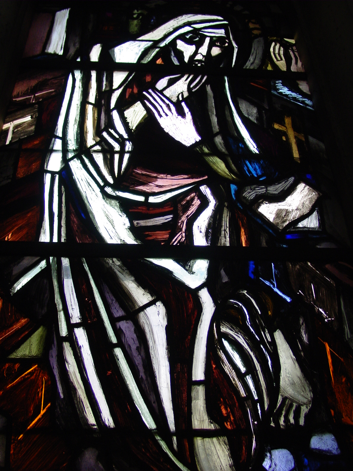 Kirchenfenster von Wilburgis (Wilbirg) in der Pfarrkirche Liesing (Wien 23) Bild von mir selbst aufgenommen im sommer 2005